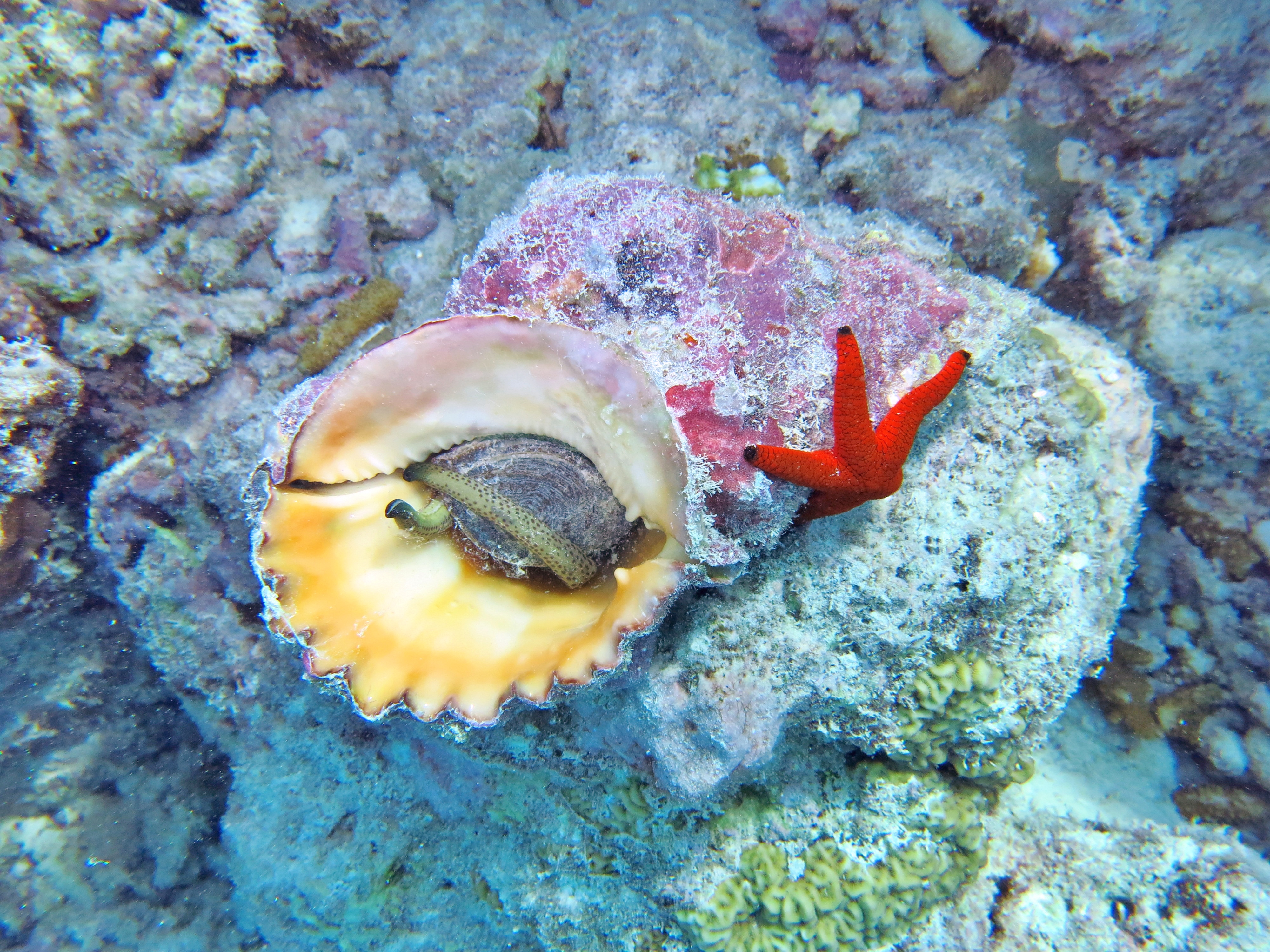 Une ranelle géante (Bursa bulbo) dévorant une étoile de mer Linckia multifora, pendant qu'une imprudente Fromia indica escalade sa coquille, aux Maldives (Landaagiraavaru, atoll de Baa).